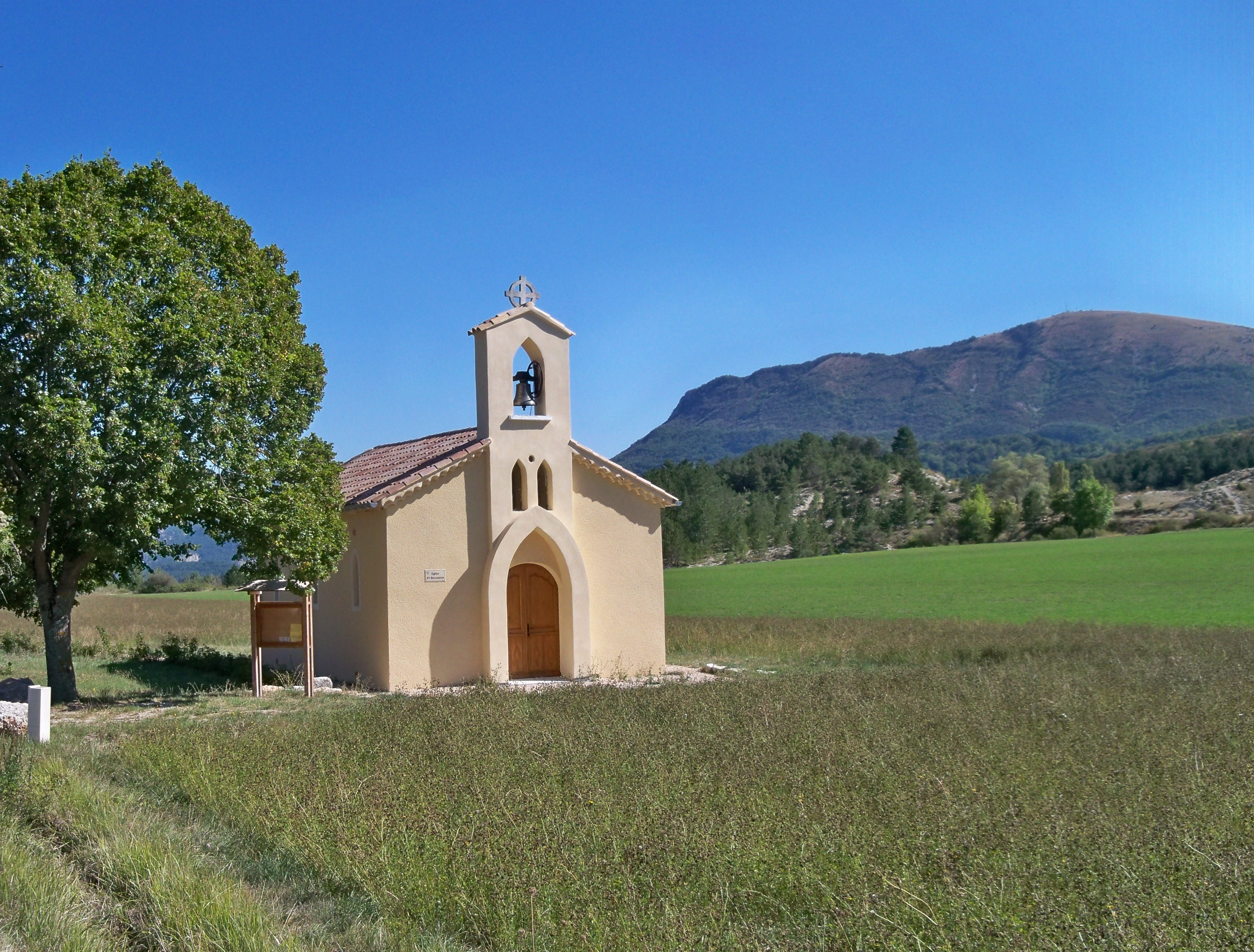 église Sainte Bernadette à Villefranche le Chateau